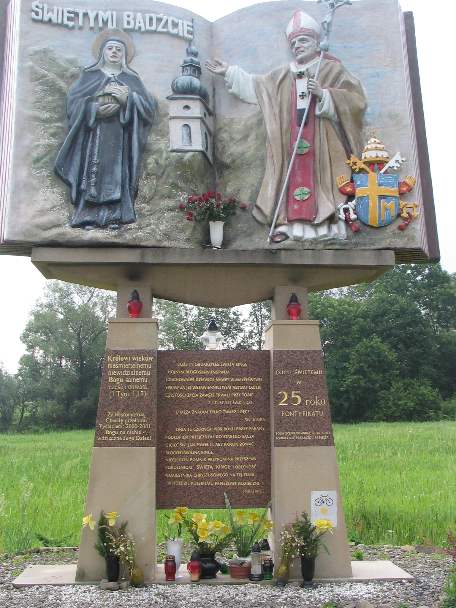 Sw Kinga Canonization Monument in Zamieście, Poland